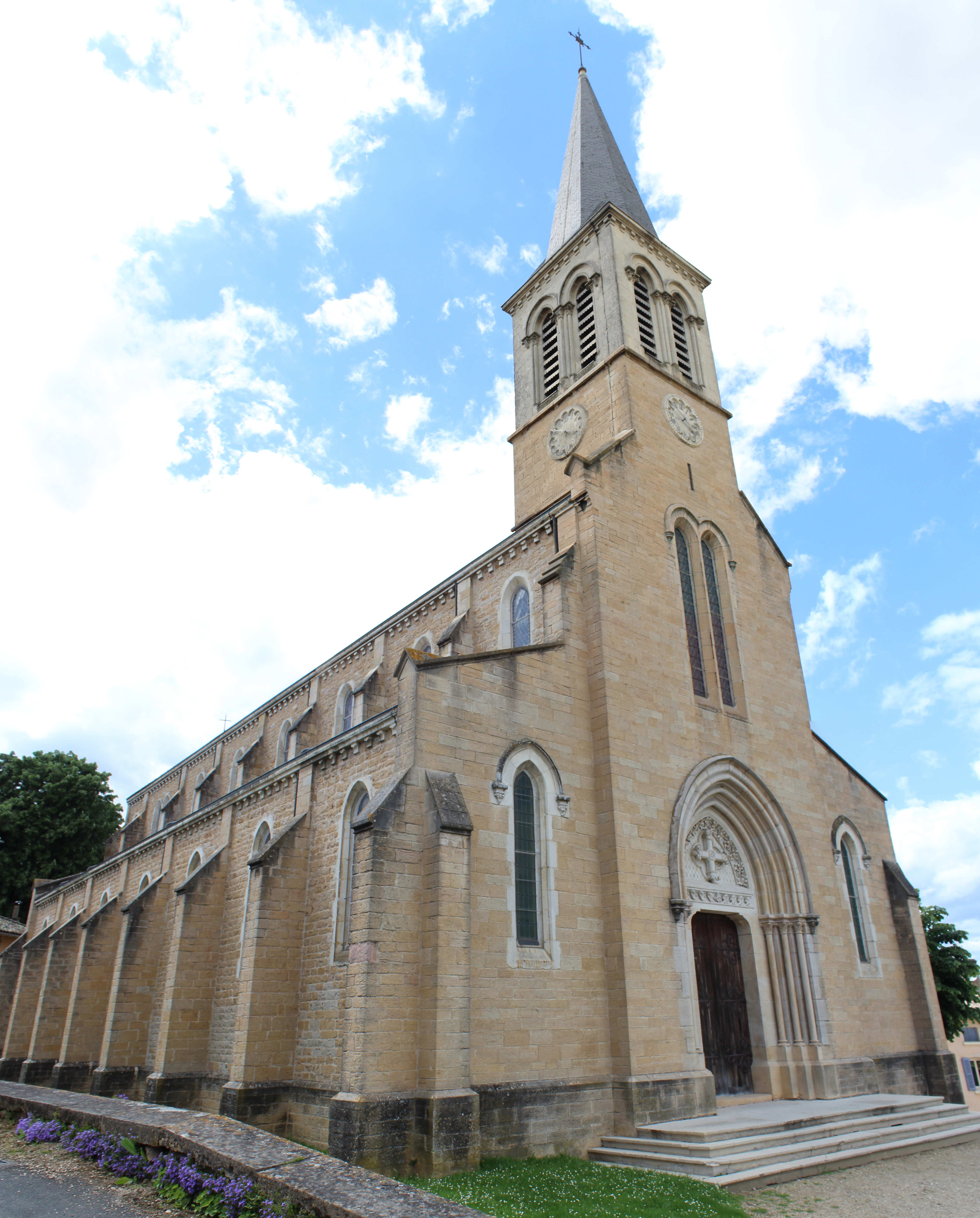 Église Saint-Vincent de Mogneneins.